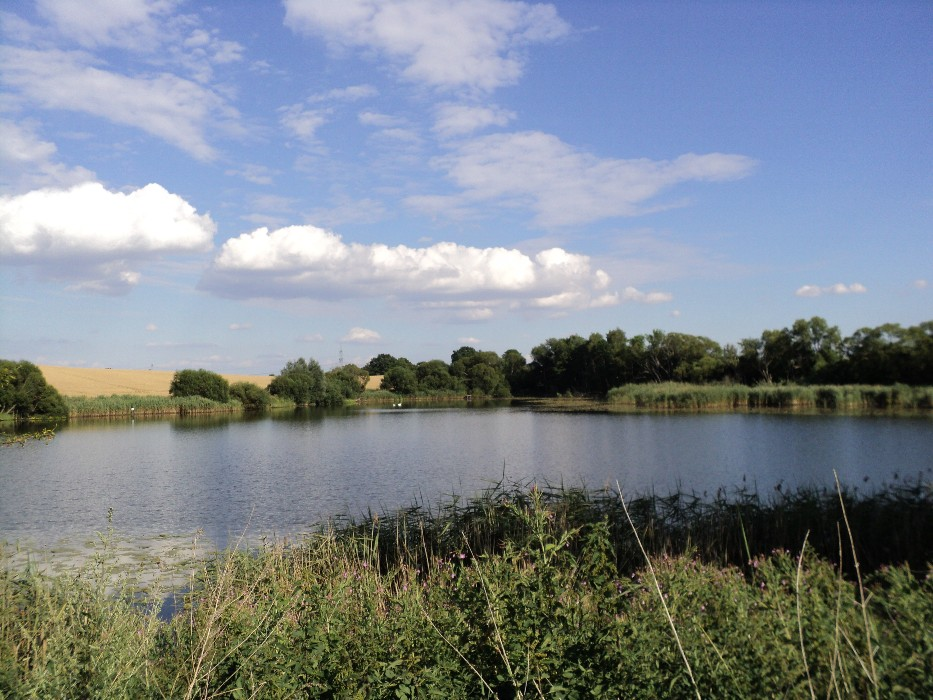 Der Kleine See, vom Westufer gesehen